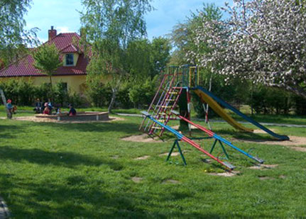 Jordan's Garden, Poland Author: Anna Ordyczyńska Permission - see Dyskusja